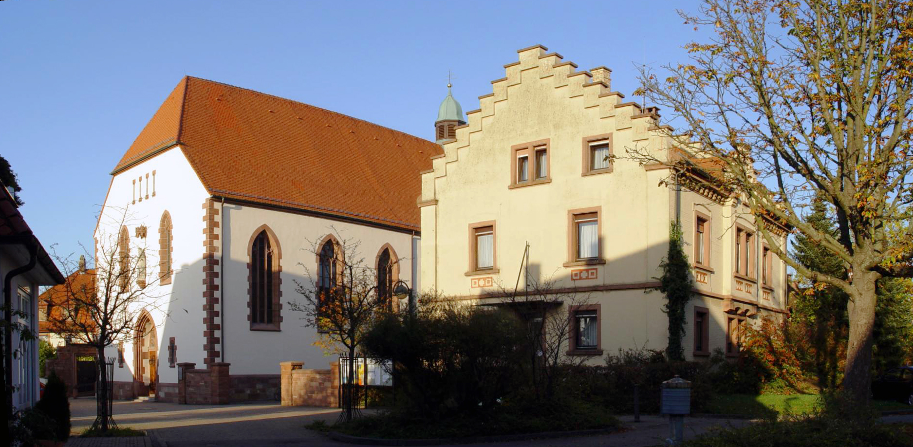 Fotografiert von Martin Dürrschnabel Kirche Maria Bickesheim Durmersheim, Deutschland.